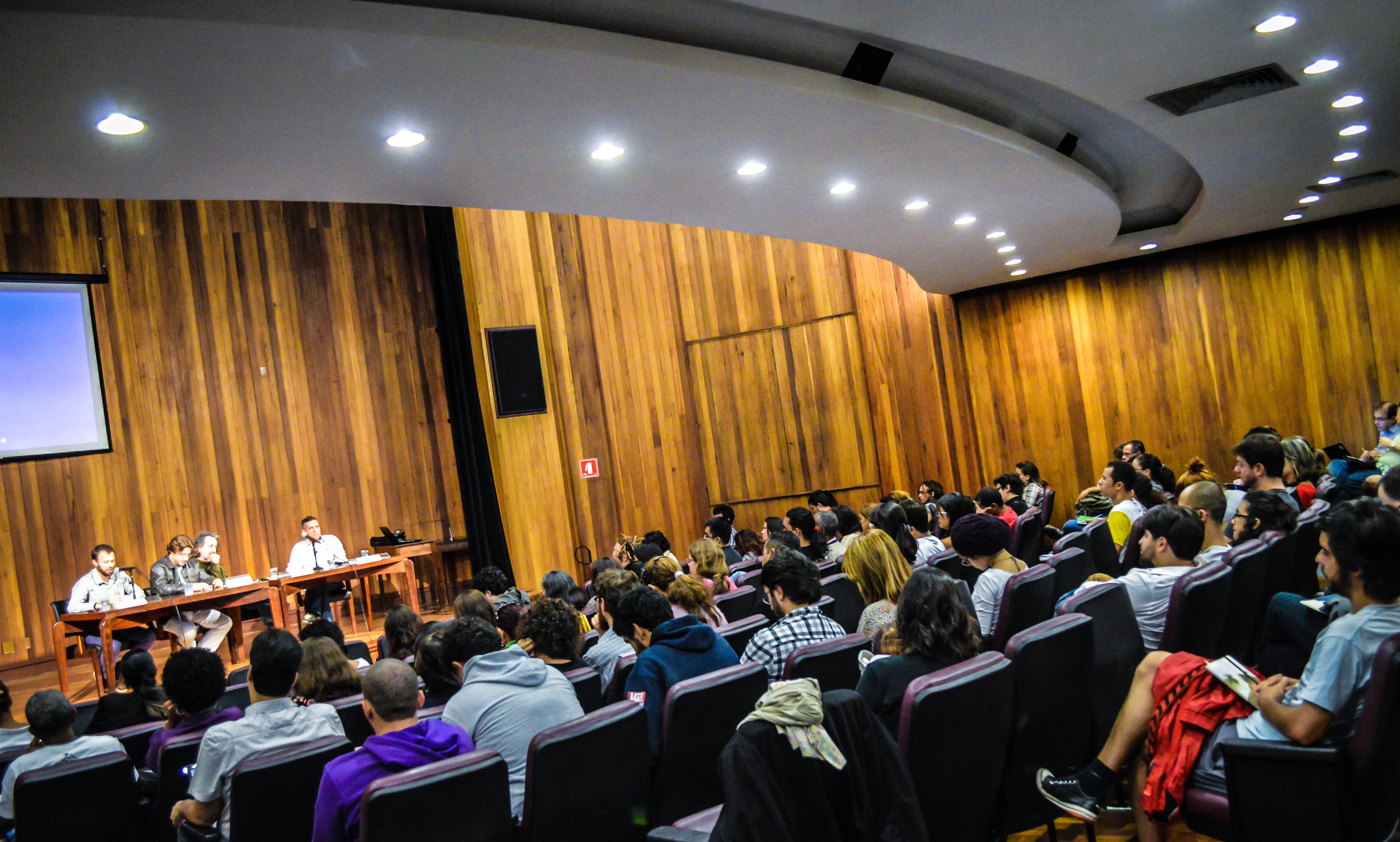 Mesa 1 - Tecnologia e Sociedades de Controle do Seminário Tecnologia, Cultura e Poder no Mundo Contemporânea na Biblioteca Mário de Andrade. Integrantes: Peter Pal Pelbart (PUC/SP), Henrique Parra (UNIFESP) e Claudio Penteado(UFABC), mediação de Rodrigo Savazoni. 24/03/2014 | São Paulo-SP (CC BY-SA) Fora do Eixo